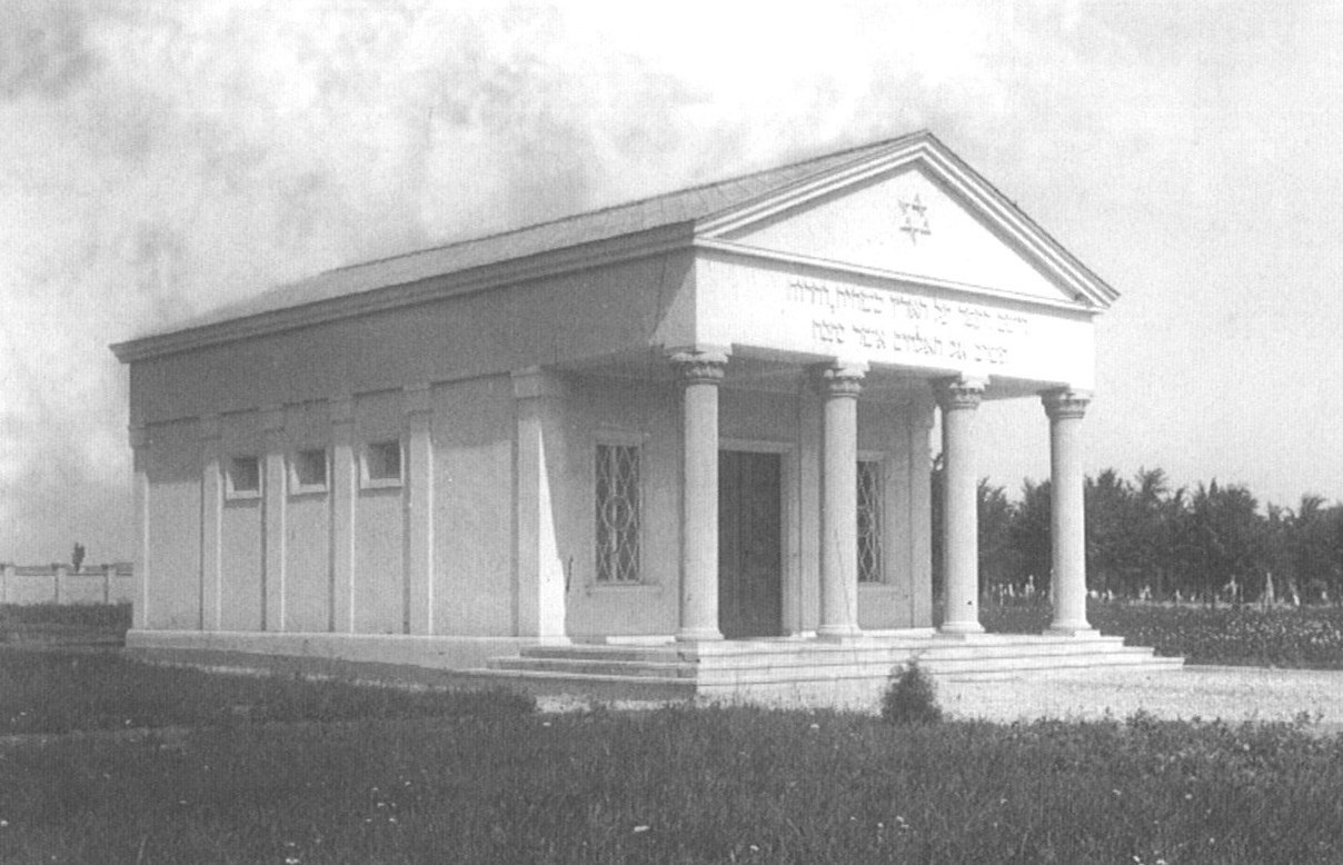 Původní podoba obřadní síně židovského hřbitova v Kroměříži